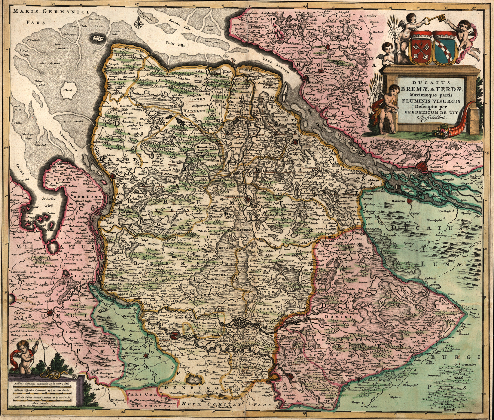 abgebildet sind die Herzogtümer Bremen und Verden (ehemals Erzbistum bzw. Bistum) im Jahre 1655, Erschienen in: Amstelodami//Amsterdam, Maßstab: Ca. 1:320.000, Kupferstich„Vergessen“ wurde der Territorialbesitz der beiden Freien Reichsstädte Hamburg und Bremen. Letzterer ist in der Darstellung dem Amt Freudenberg zugeschlagen.